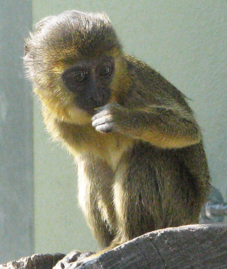 Petit cercopithèque à tête de hibou (Cercopithecus hamlyni) âgé de 5 mois.